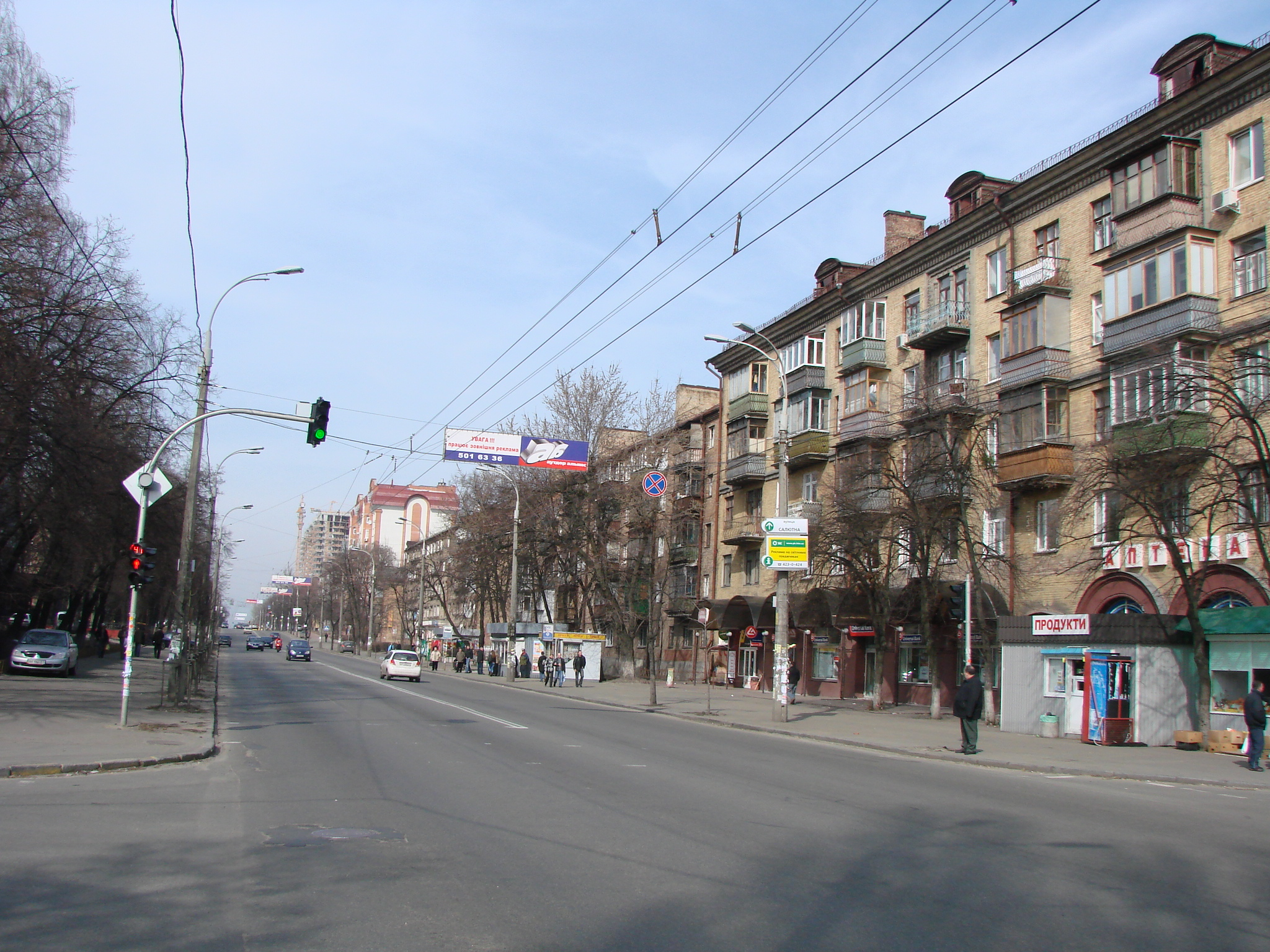 вулиця Щербакова